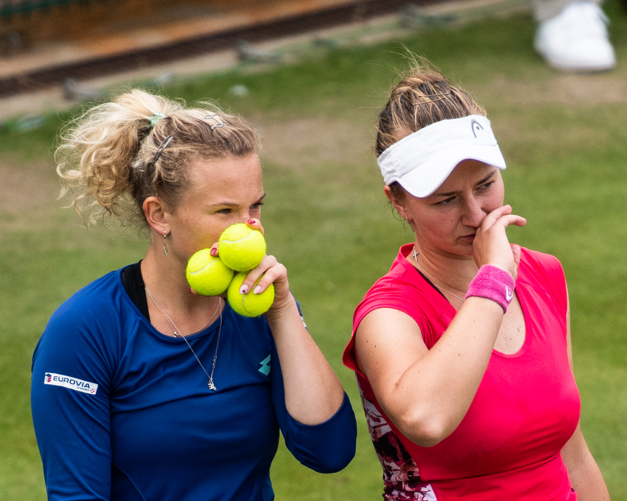 Katerina Siniakova & Barbora Krejcikova